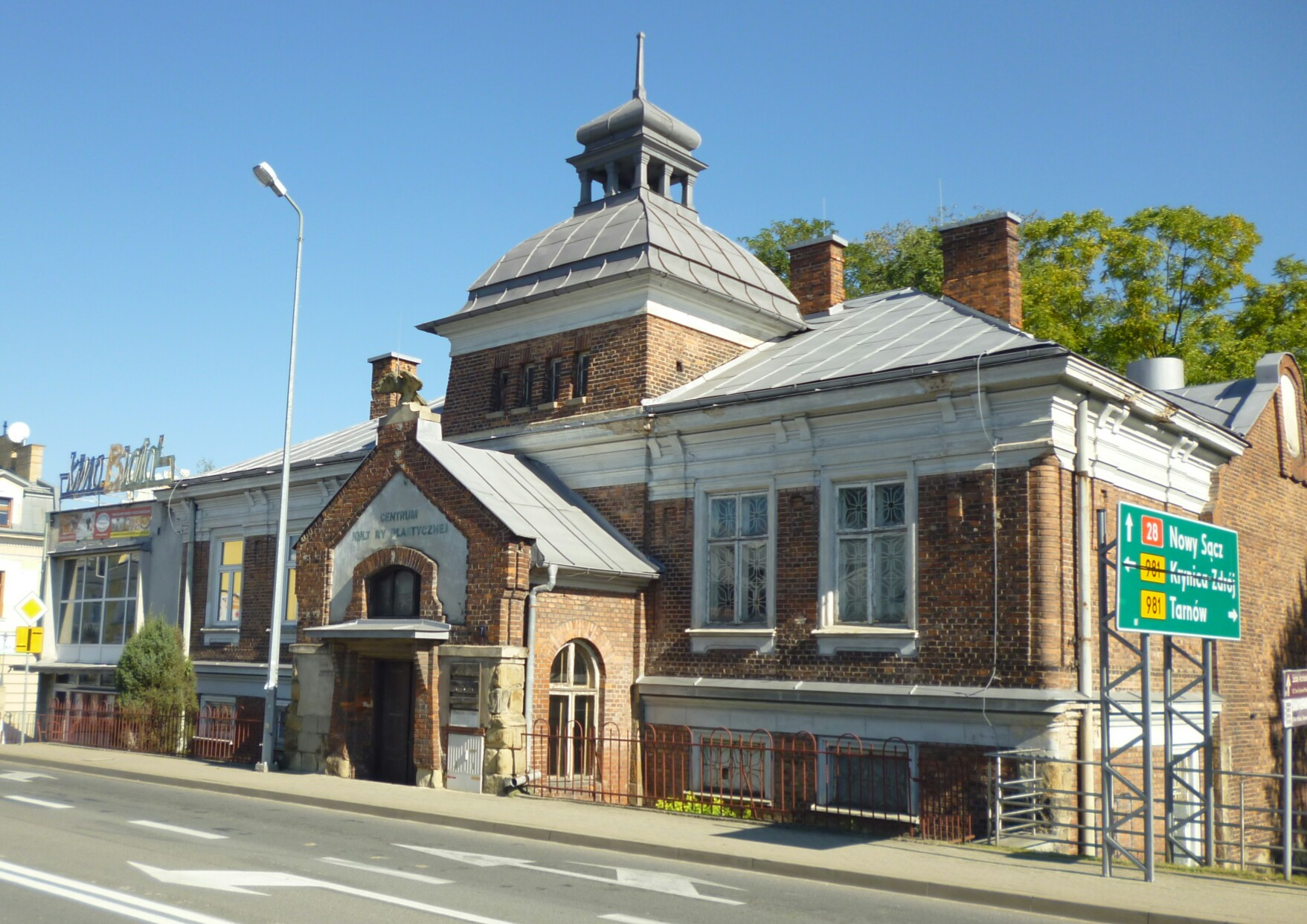 Siedziba dawnego Polskiego Towarzystwa Gimnastycznego „Sokół”, obecnie w budynku mieści się Miejski Dom Kultury w Grybowie.